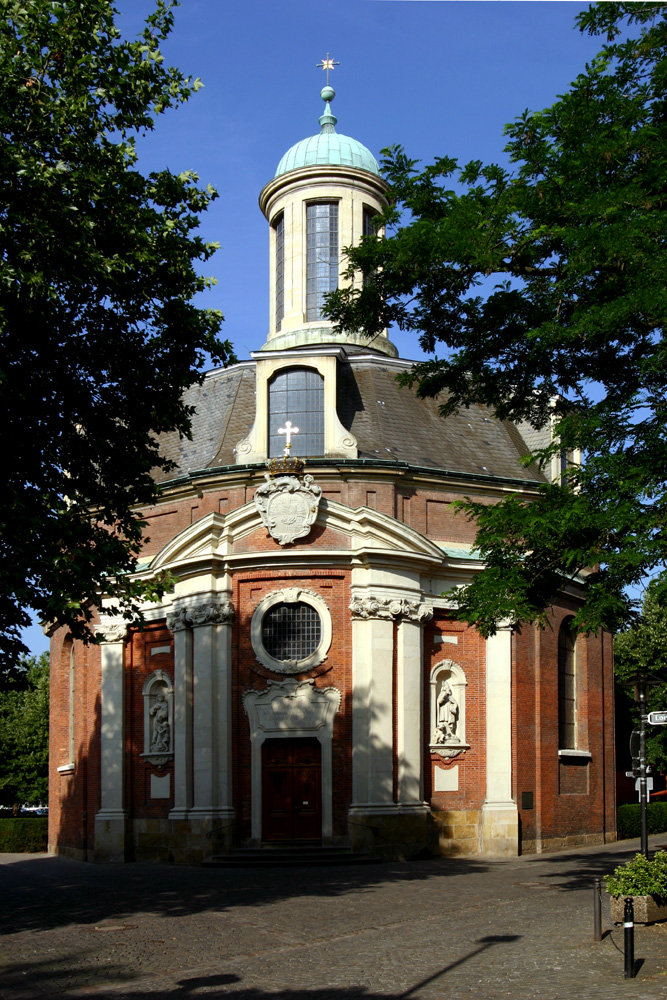 Clemenskirche in Münster, Der Rundbau mit Kuppel und Laterne ist der bedeutendste barocke Kirchenbau Nordwestdeutschlands. Architekt Johann Conrad Schlaun